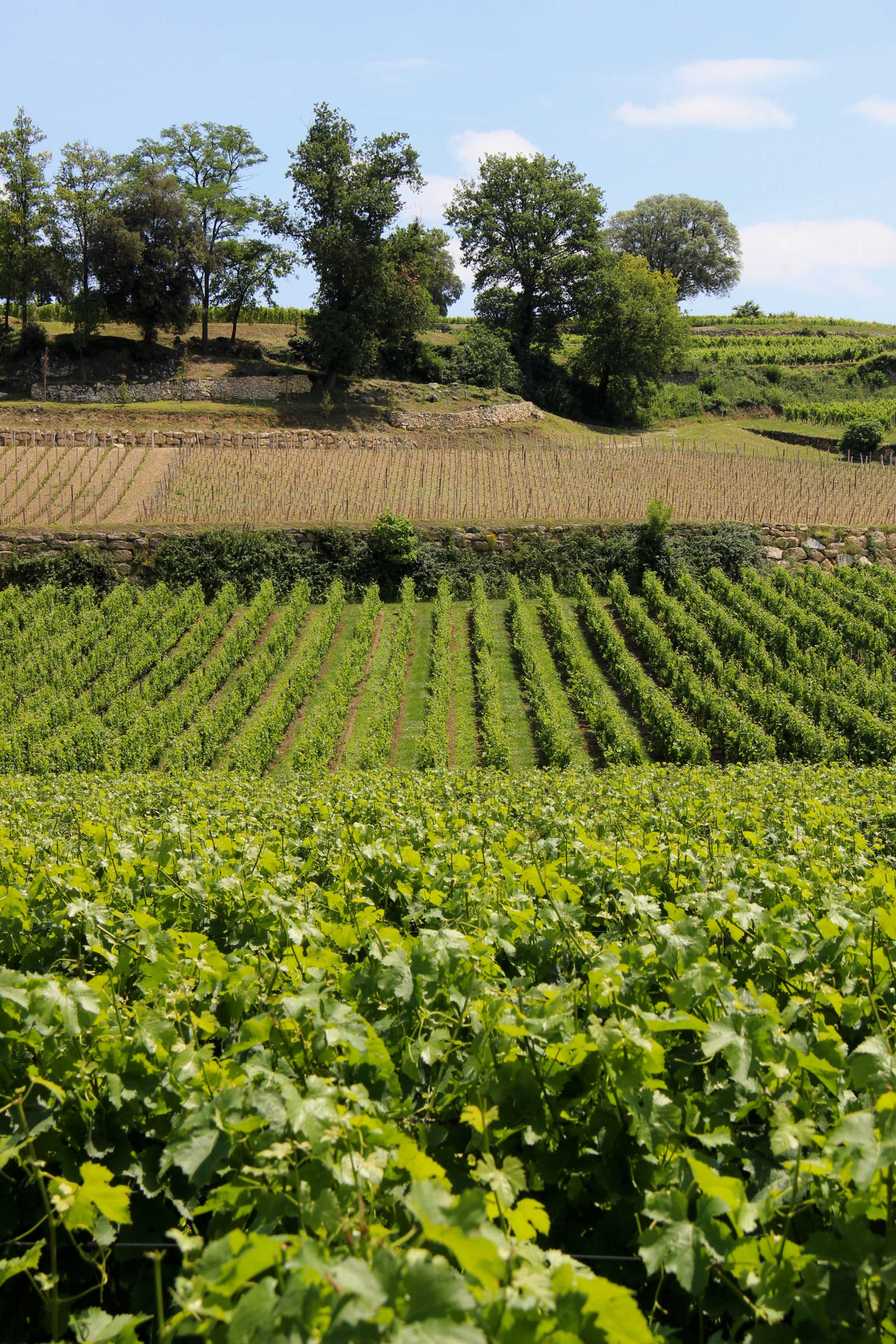 Château de Saint-Émilion 01